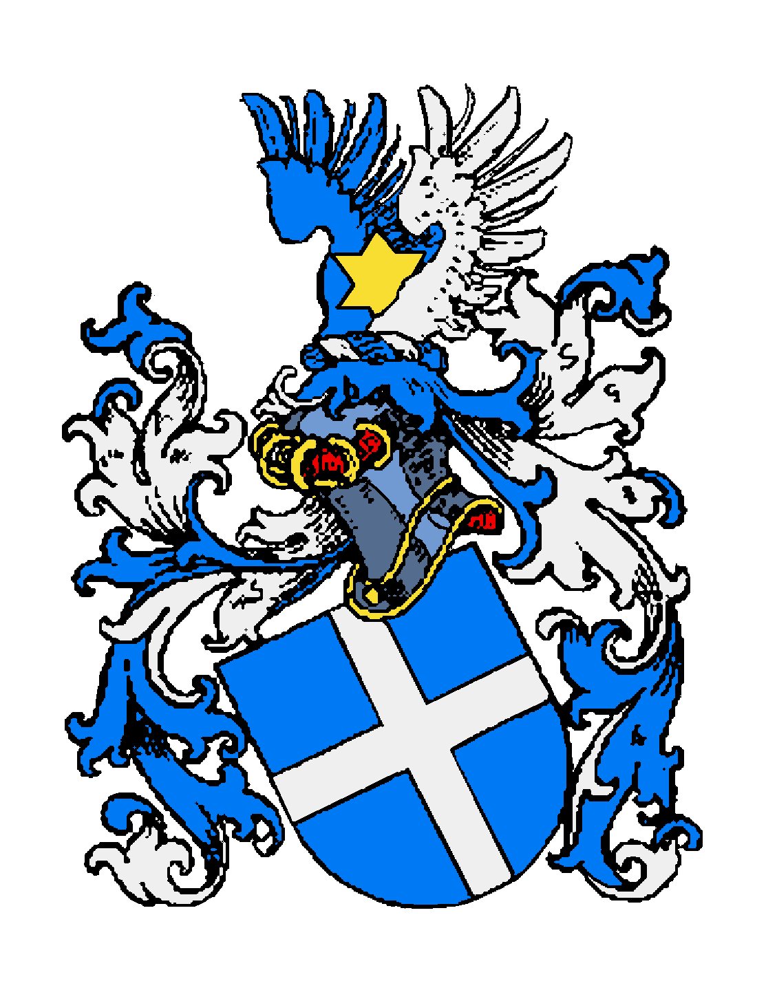 Stammwappen der von Tornaco (de Tornaco); luxemburgisch-deutsches Adelsgeschlecht